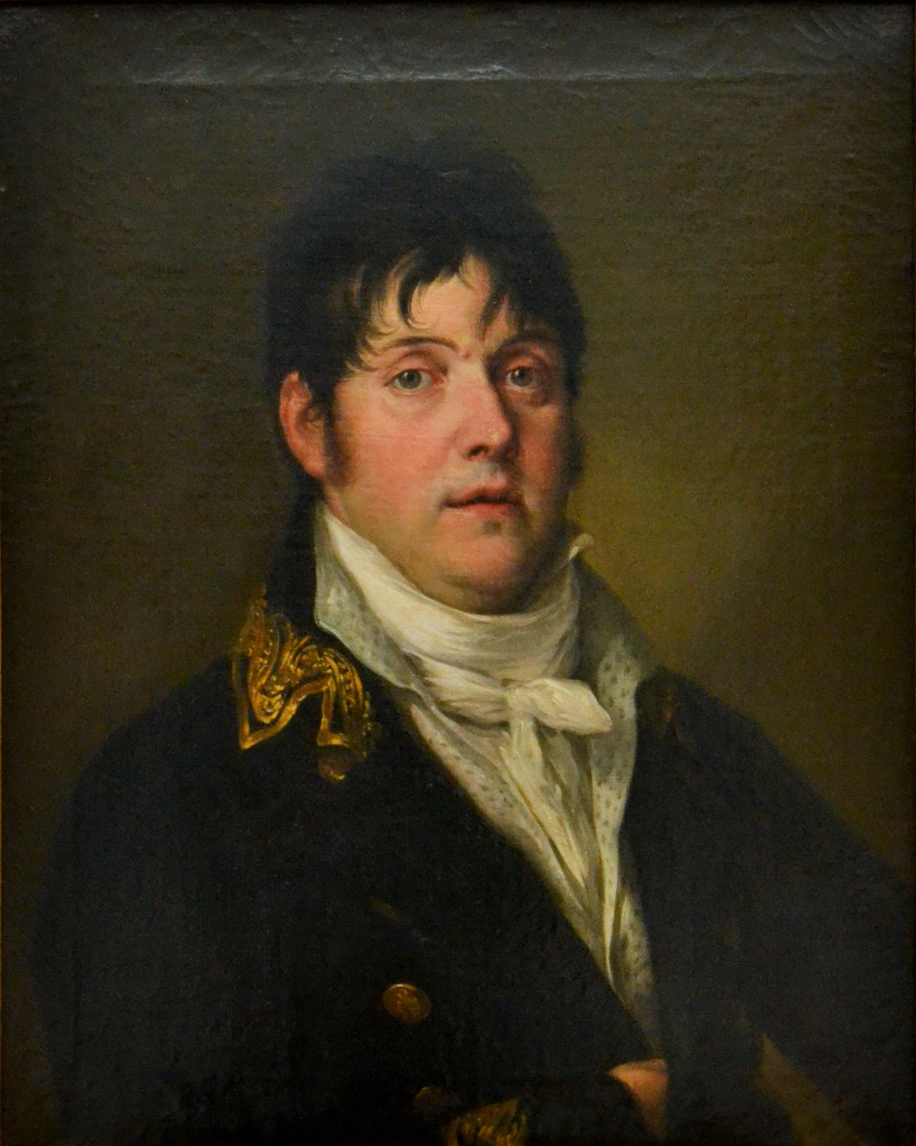 Retrato del grabador español Tomas López Enguídanos (1775-1814).